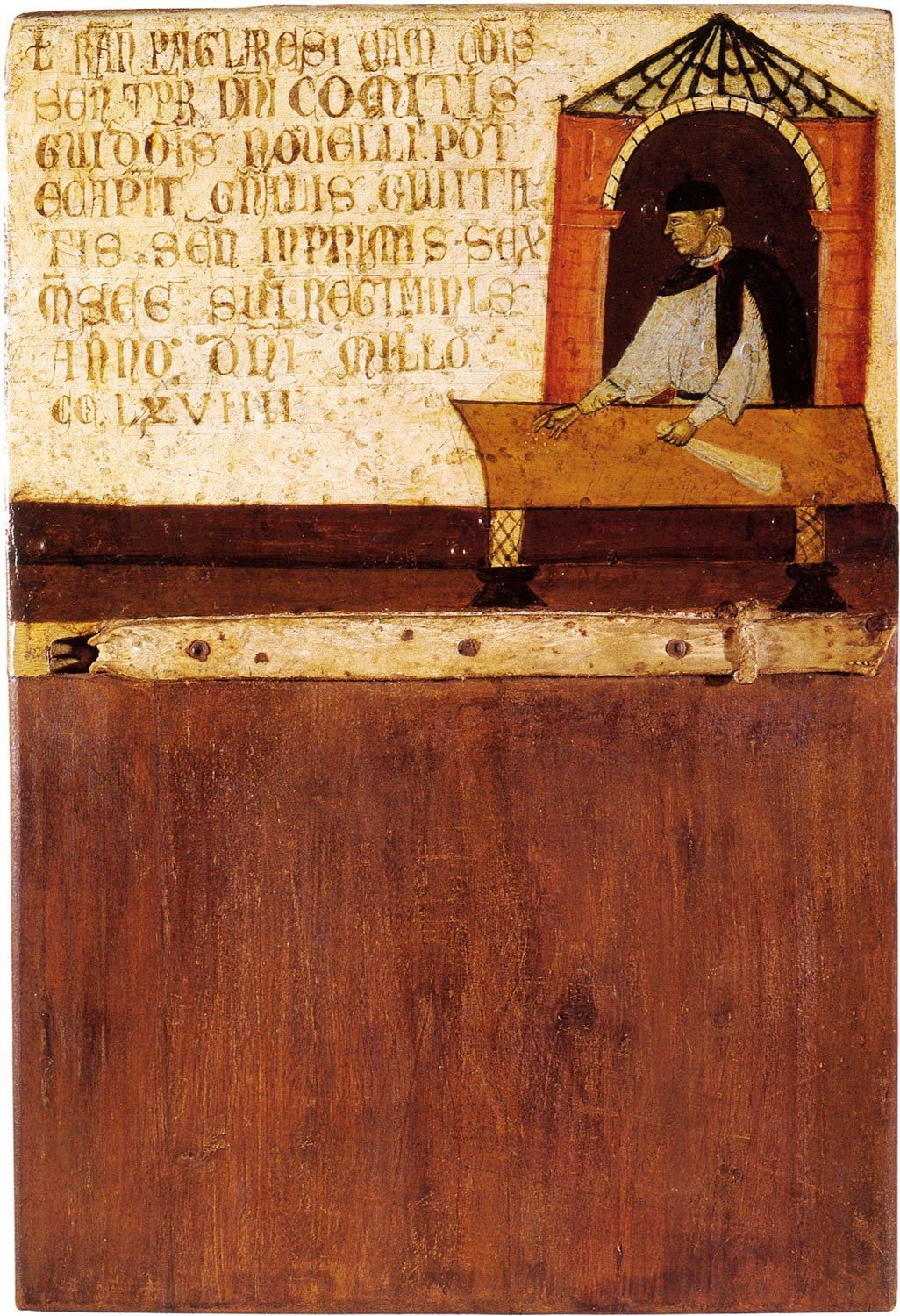 Camerlengo Ranieri Pagliare. Dietisalvi di Speme